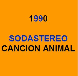 Tapa de disco